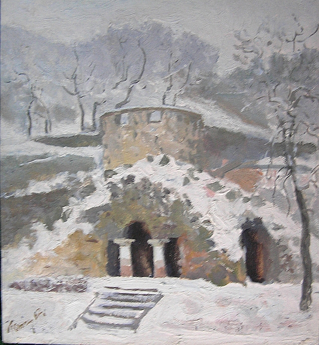 Трускавец, 1972.